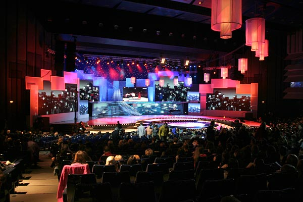 Beovizija